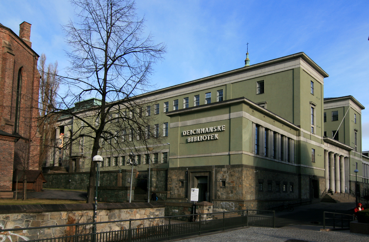 Deichmanske bibliotek, Oslo - fasade mot vest. Bygd 1924-1933; arkitekt Nils Reiersen.